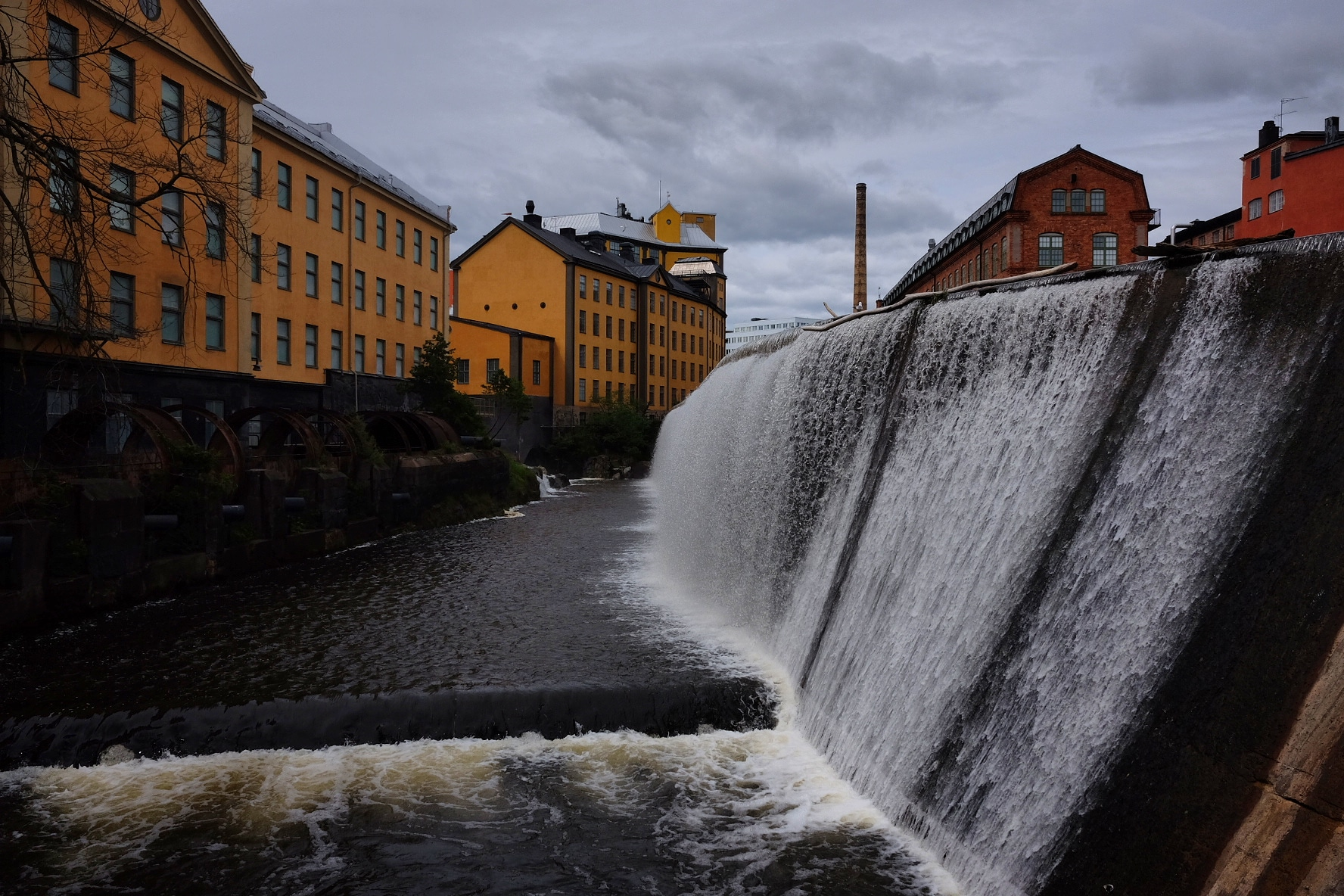 Industrilandskapet, Norrköping.